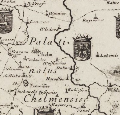 Palatinatus (Terra) Chelmensis insigneque eius, Polonia, 1696